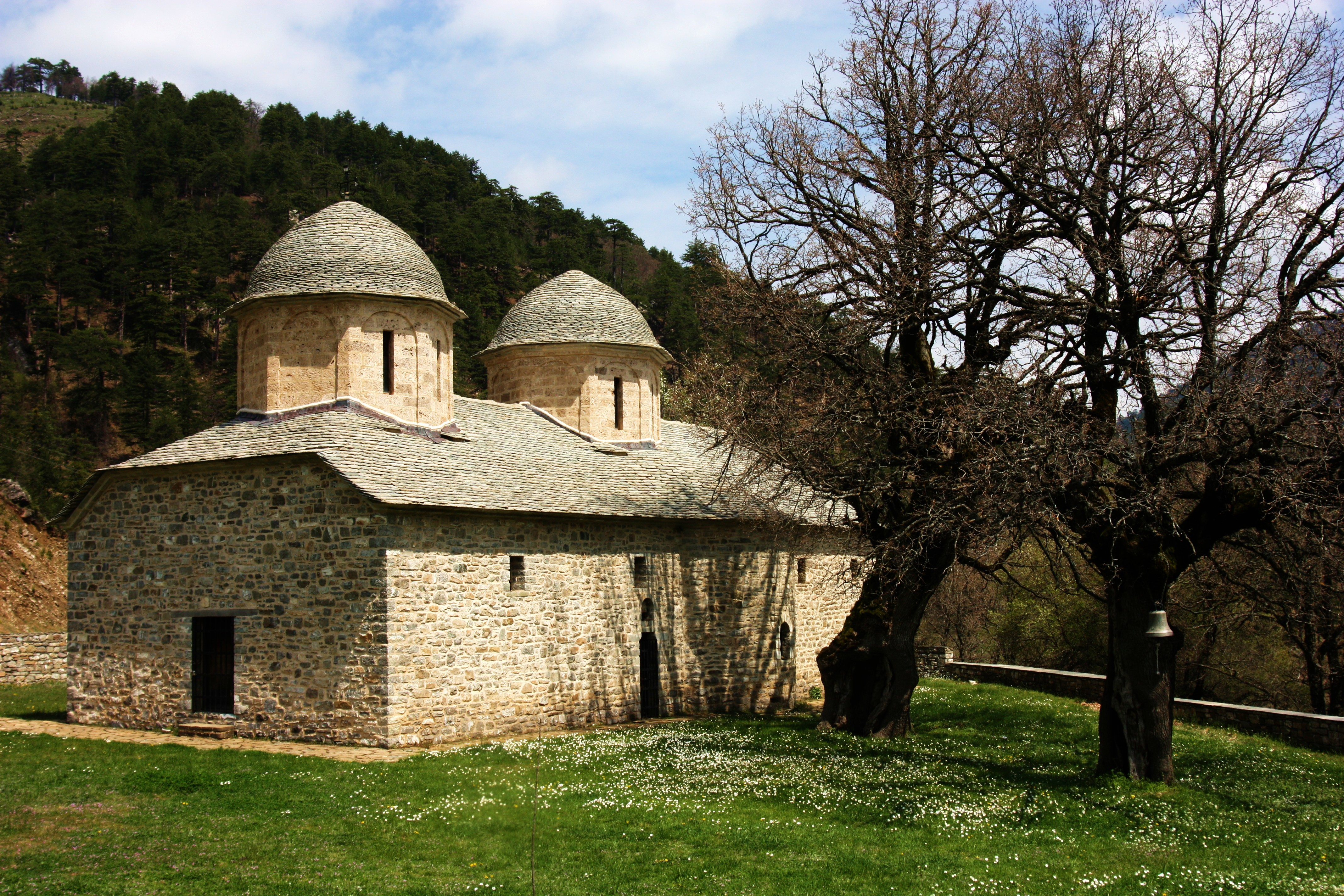 Ναός Αγίου Νικολάου στο Περιβόλι«Ναός Αγίου Νικολάου στο Περιβόλι»